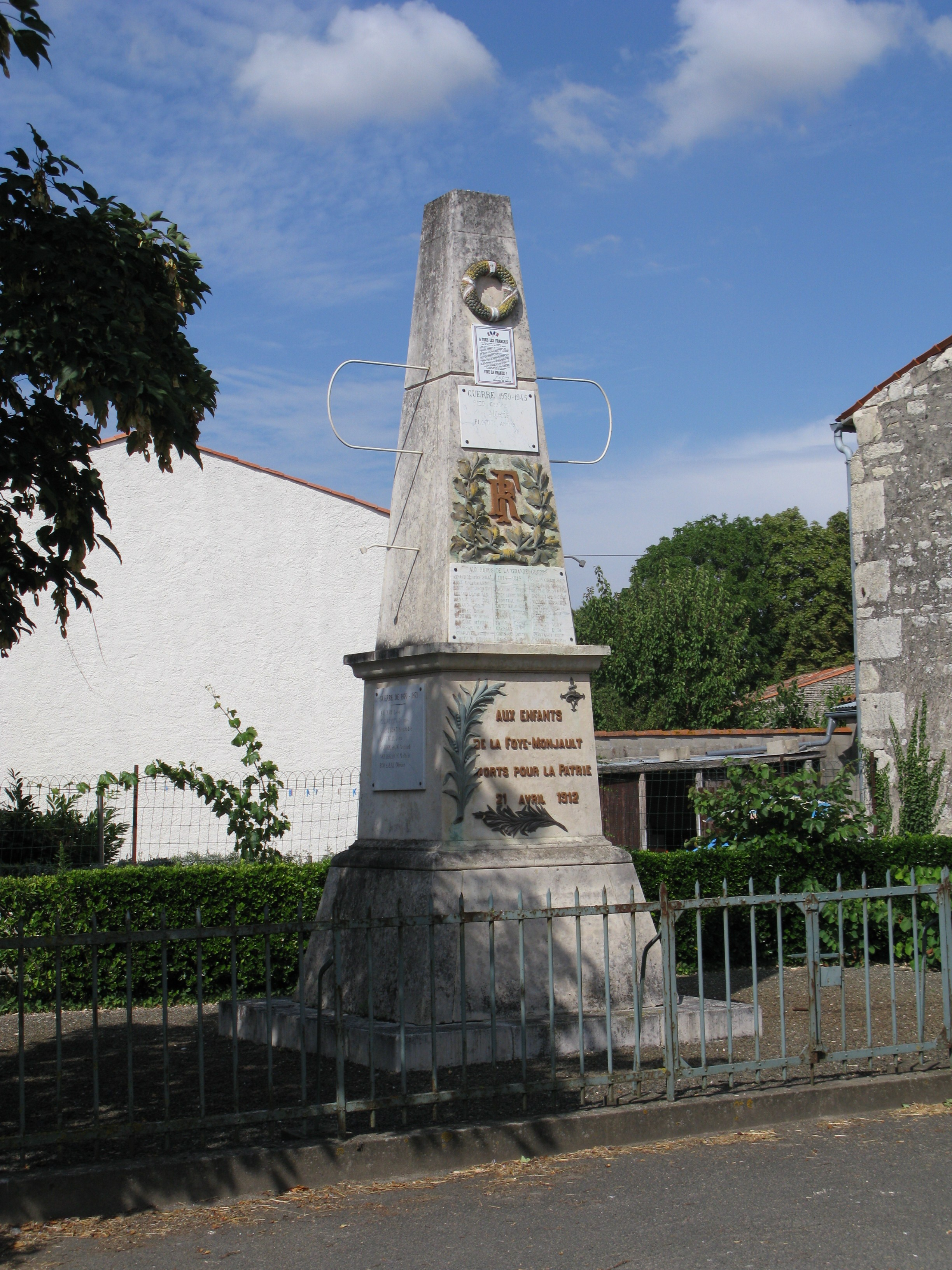 Monuments aux morts de la Foye-Monjault